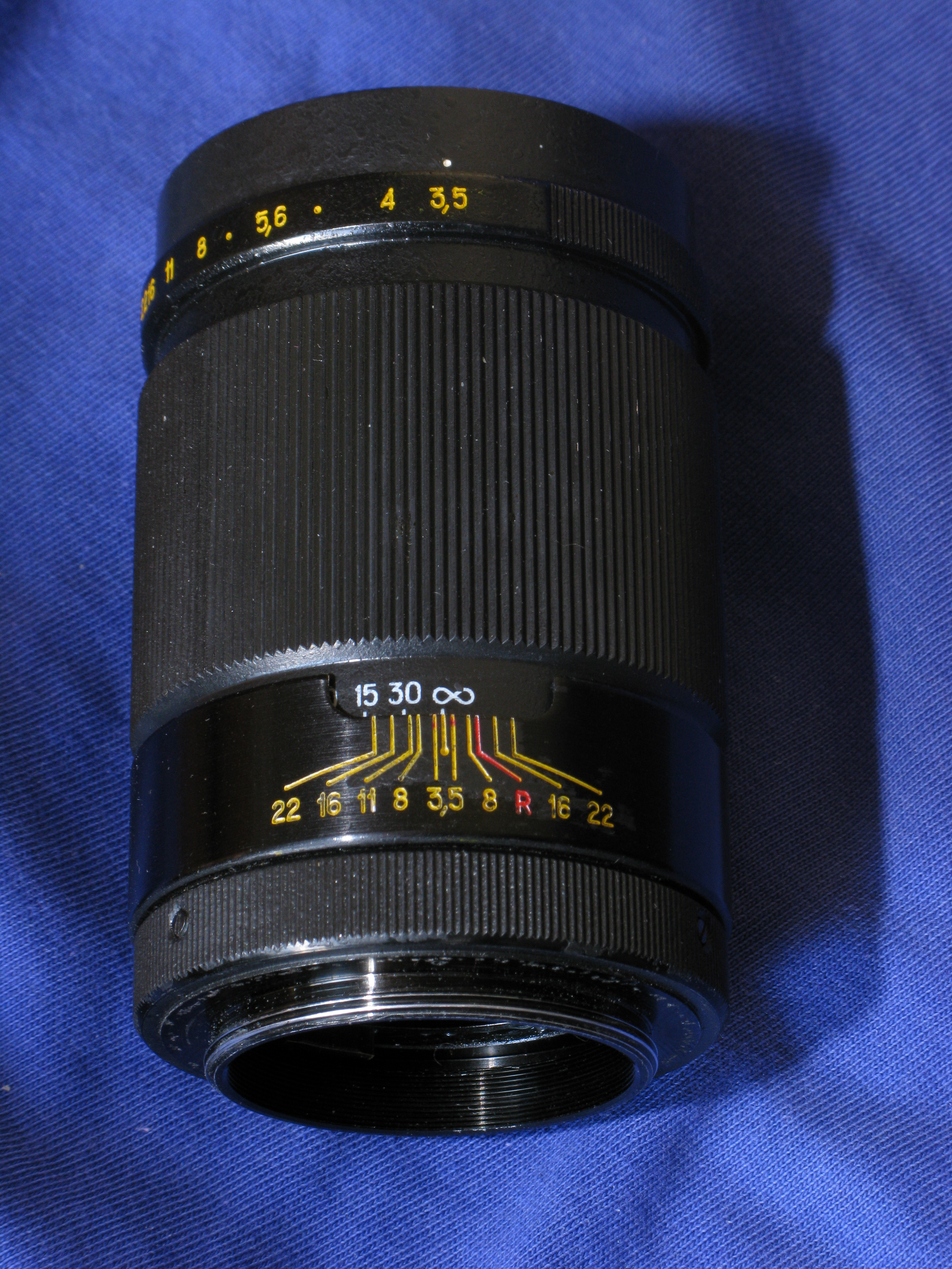 Objetivo Jupiter-37A